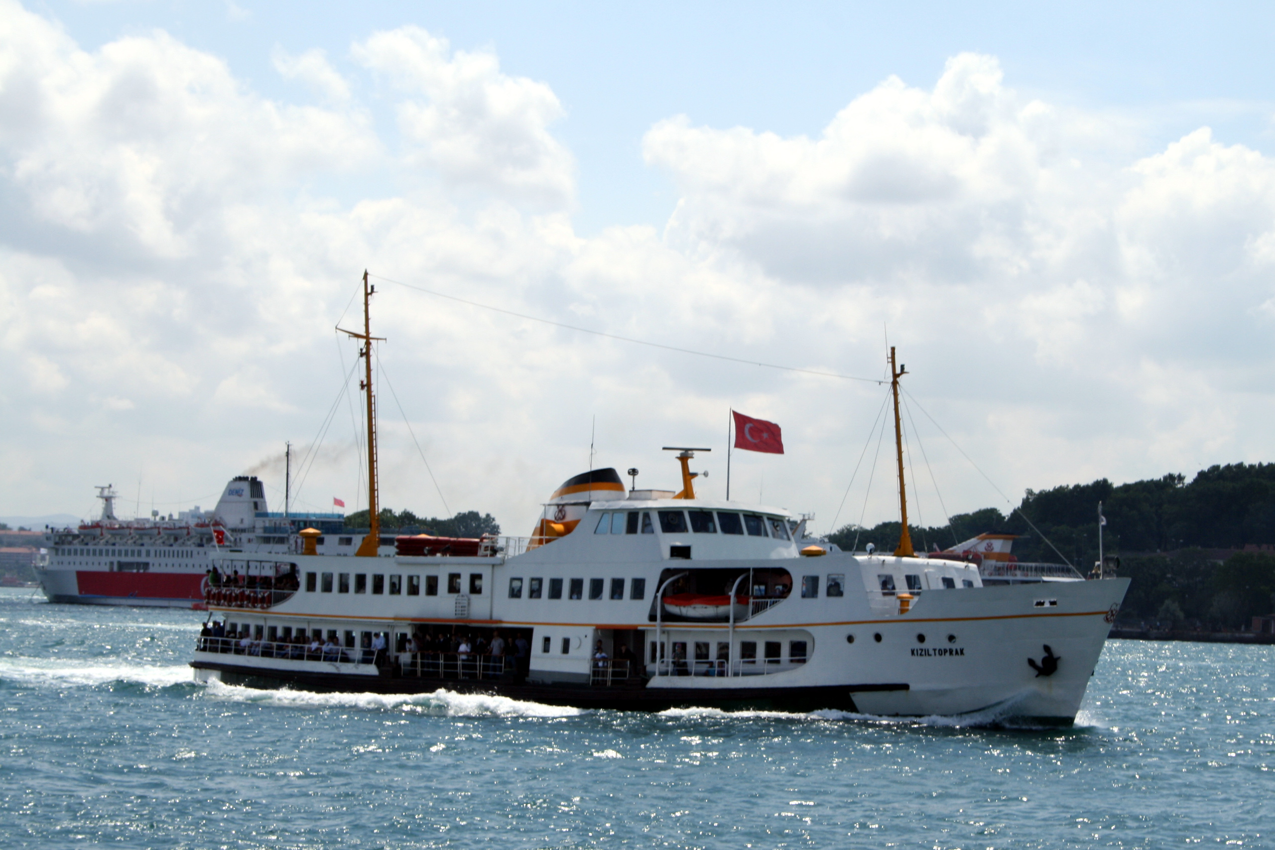 Le Kiziltropak à Istamboul